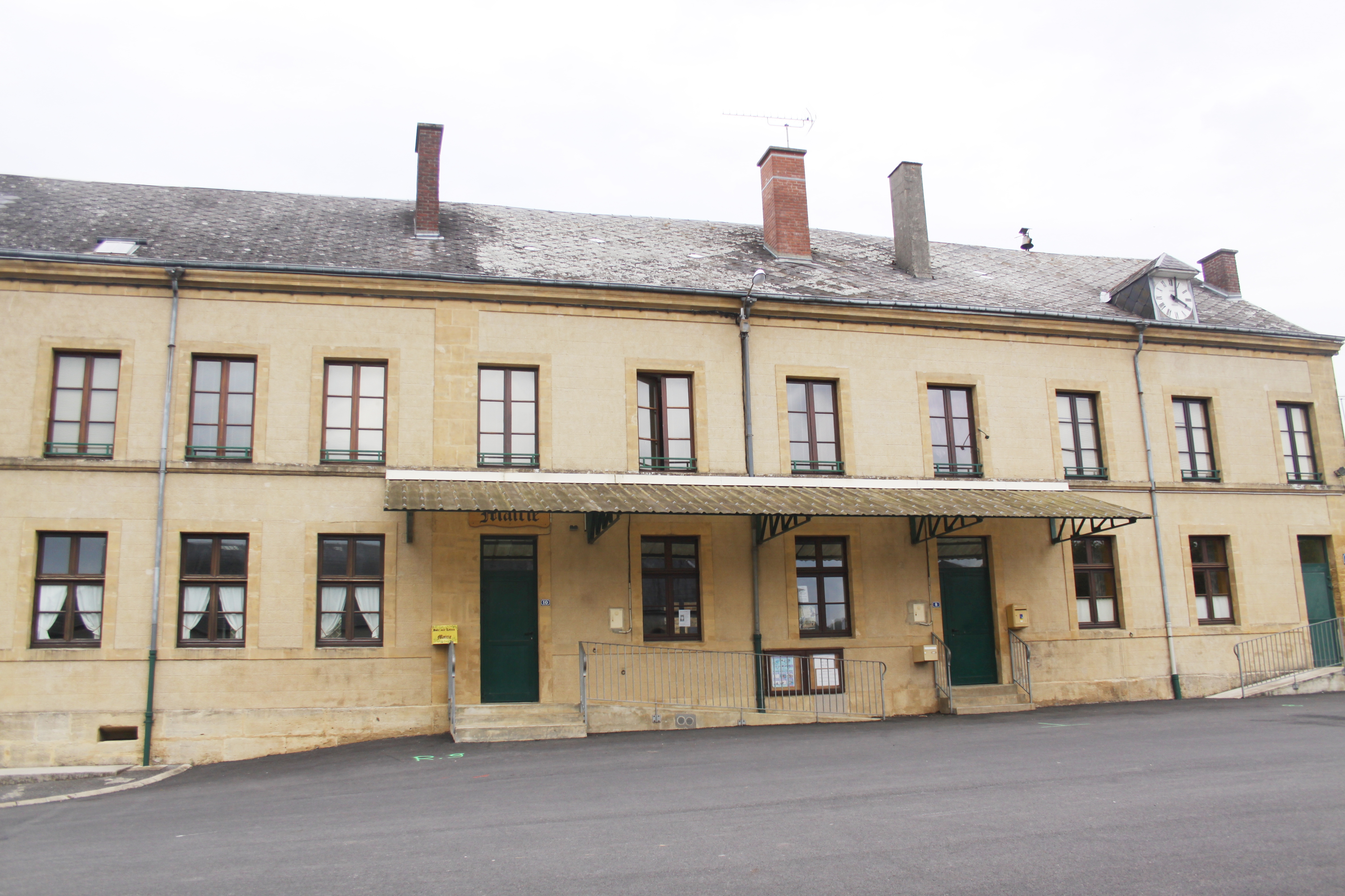 Village Ardennais